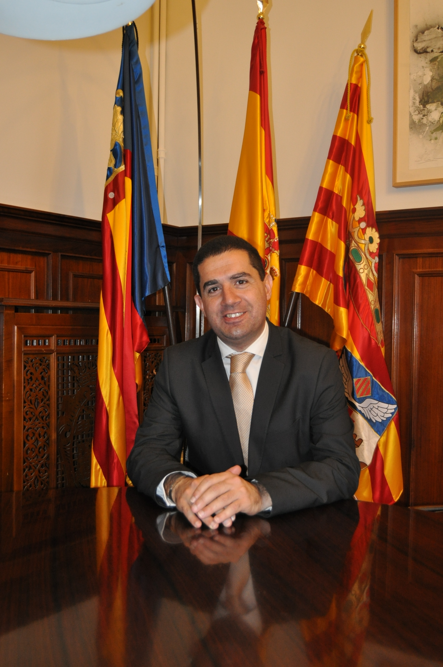 Antonio Francés Pérez